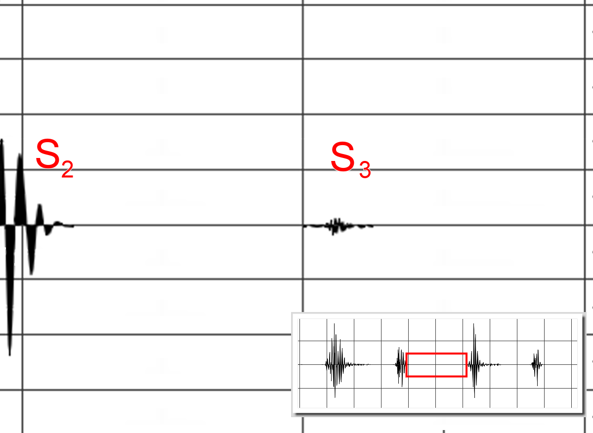 第三心音的波形